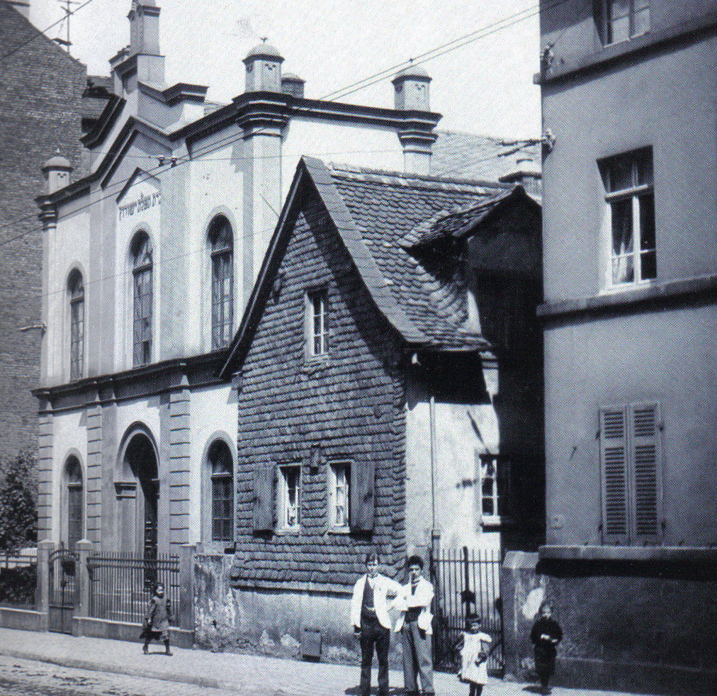 Frankfurt-Bockenheim, Schloßstraße 3-5; 1874 neugebaute Synagoge der jüdischen Gemeinde. Daneben wurde gleichzeitig ein Gemeindehaus errichtet. Beide Gebäude wurden im November 1938 angesteckt, später abgerissen.